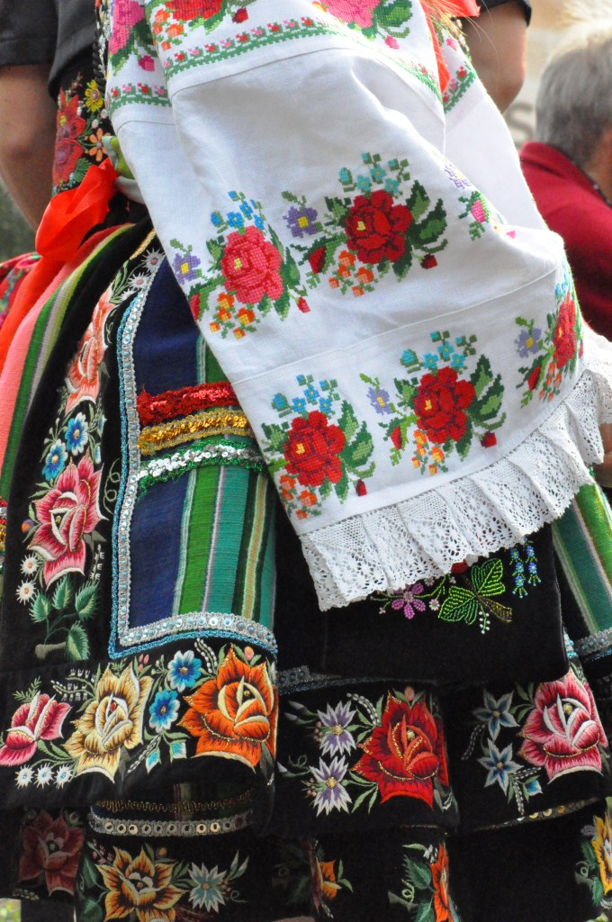 Strój łowicki, 2012